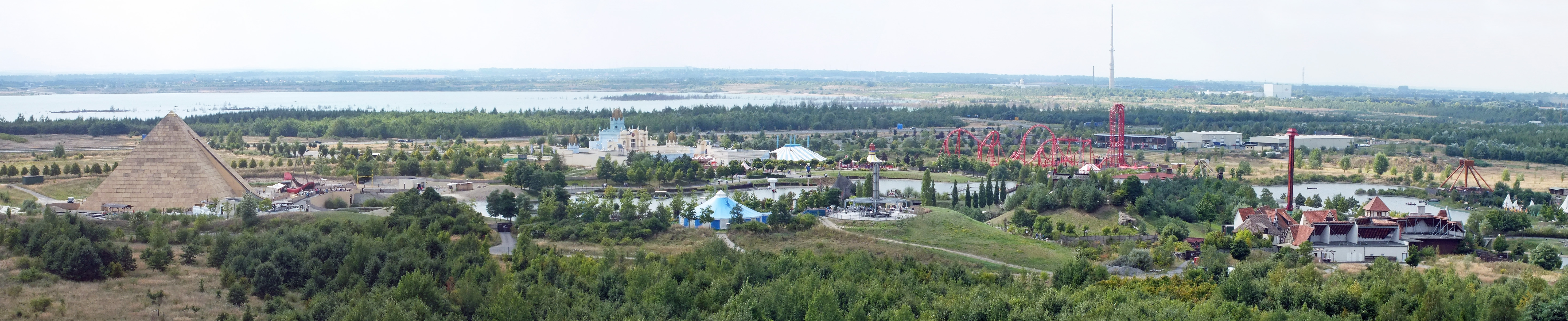 Der Vergnügungspark Belantis vom Aussichtsturm Bistumshöhe aus